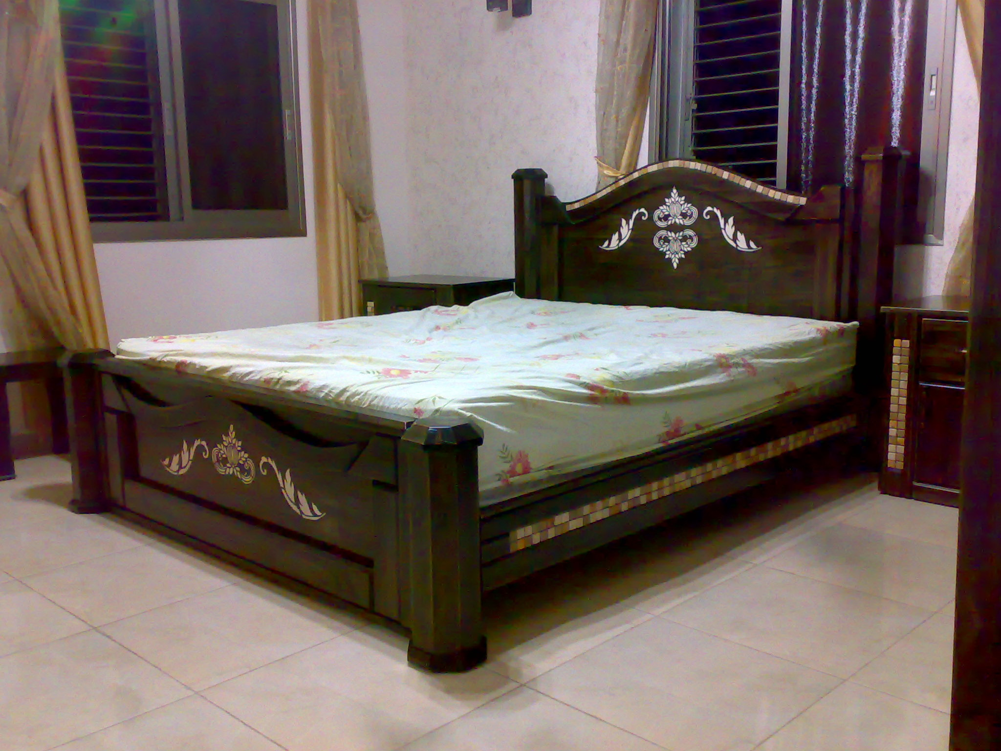 سرير نوم